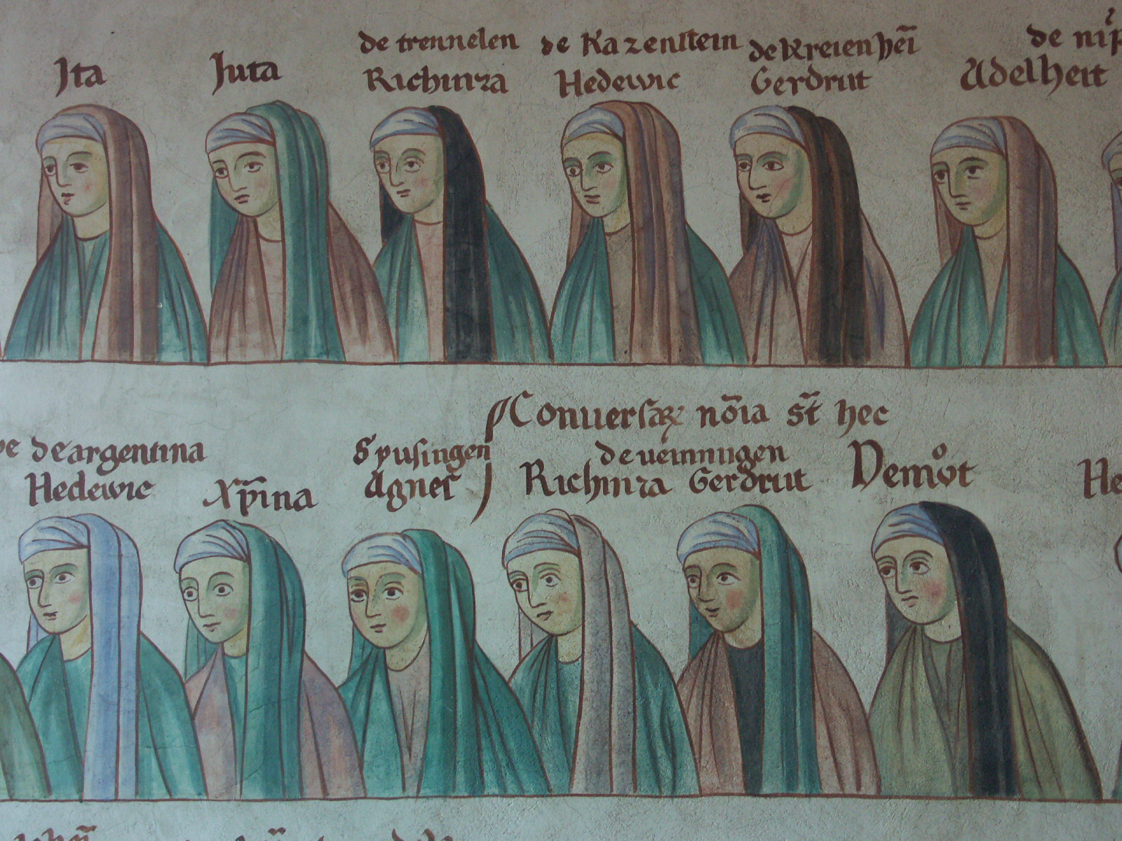 Mont Sainte-Odile, Alsace, France